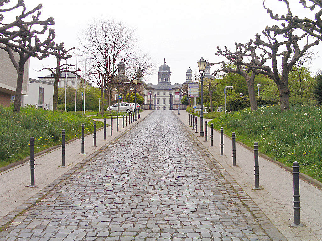 Bensberg castle – pavement